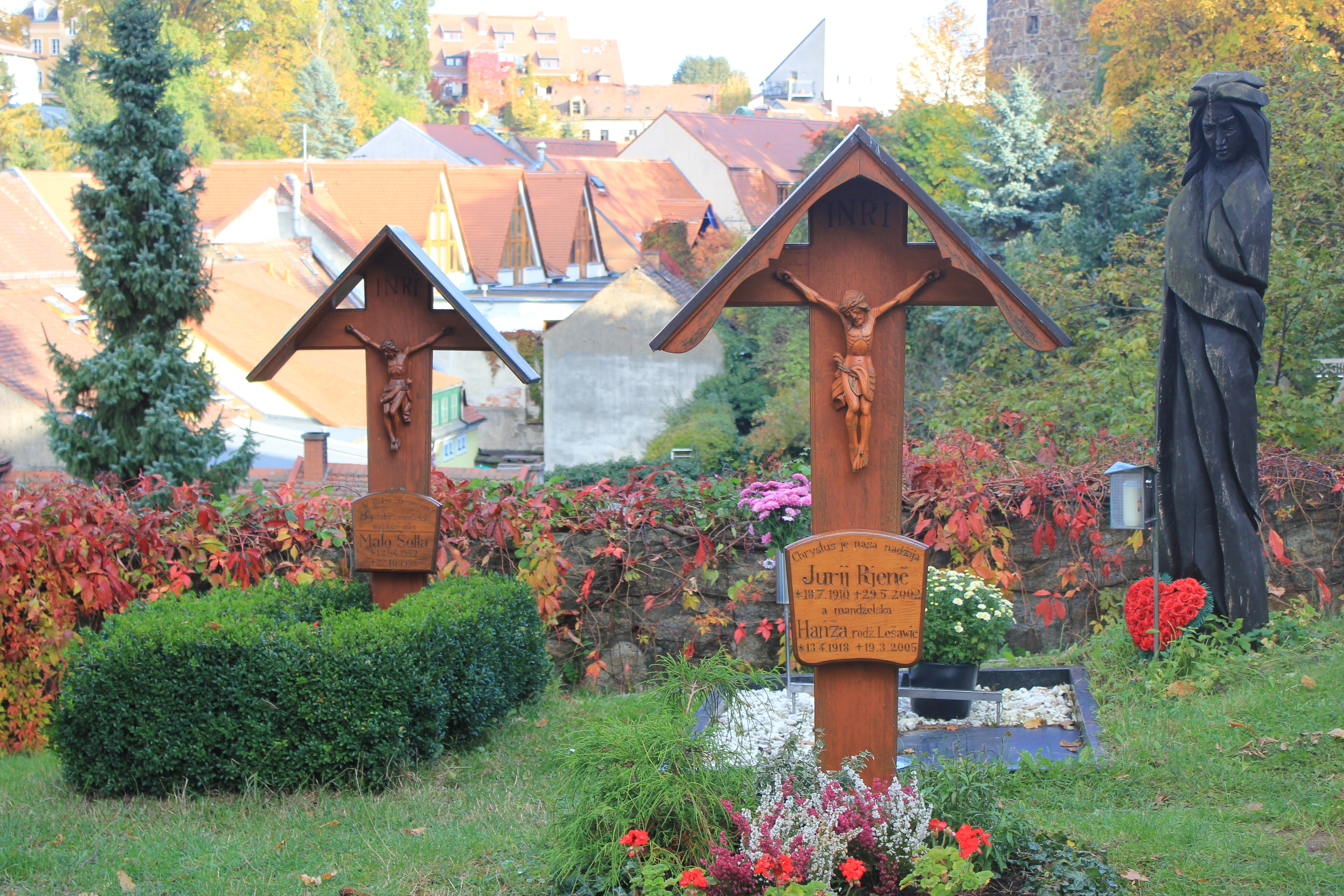 Hornjoserbsce: Narowny křiž Jurja Rjenča na Mikławšku